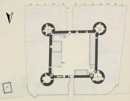 Grundriss des Schlosses Posanges